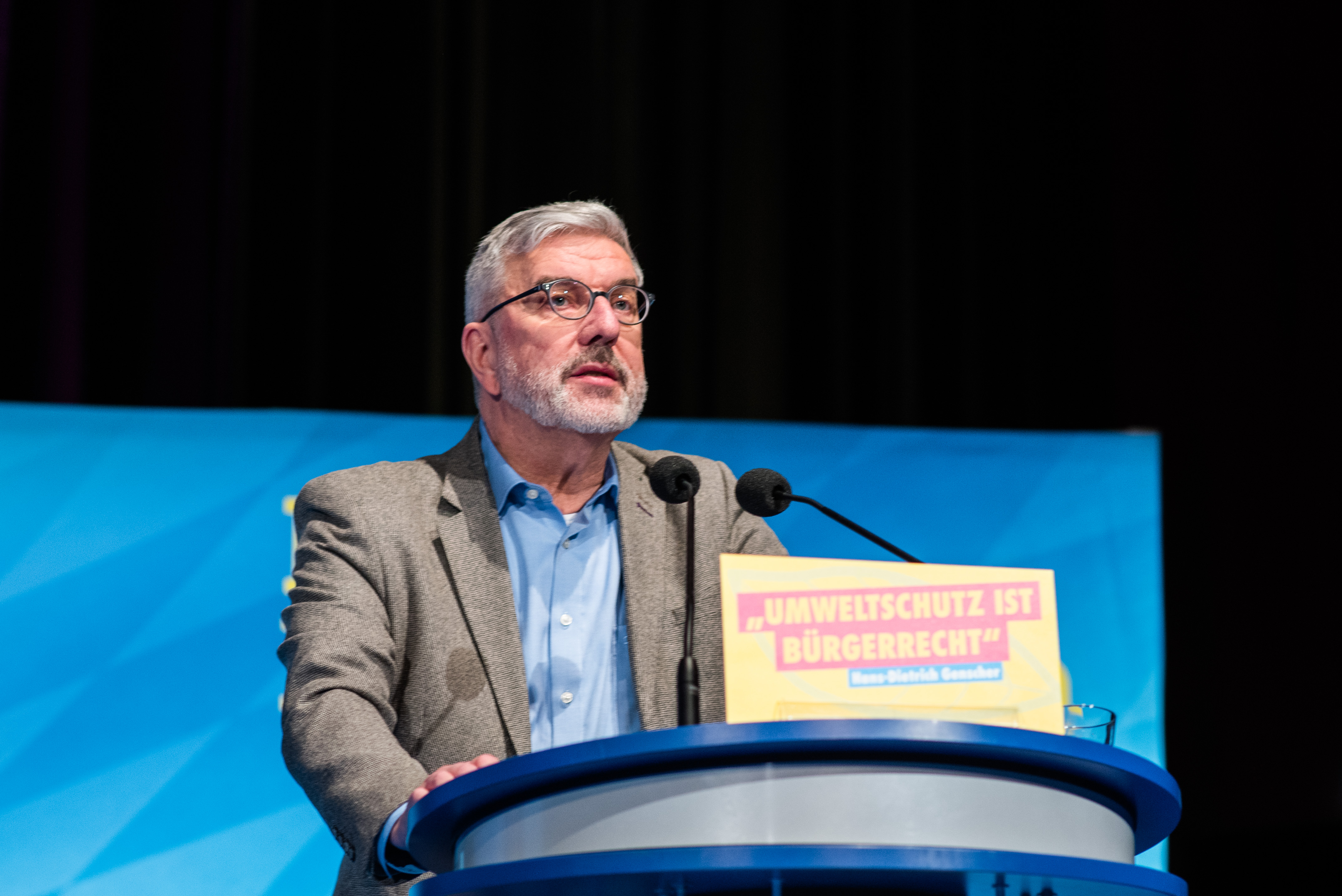 Michael Miersch als Gastredner auf dem Landesparteitag der bayerischen FDP 2019